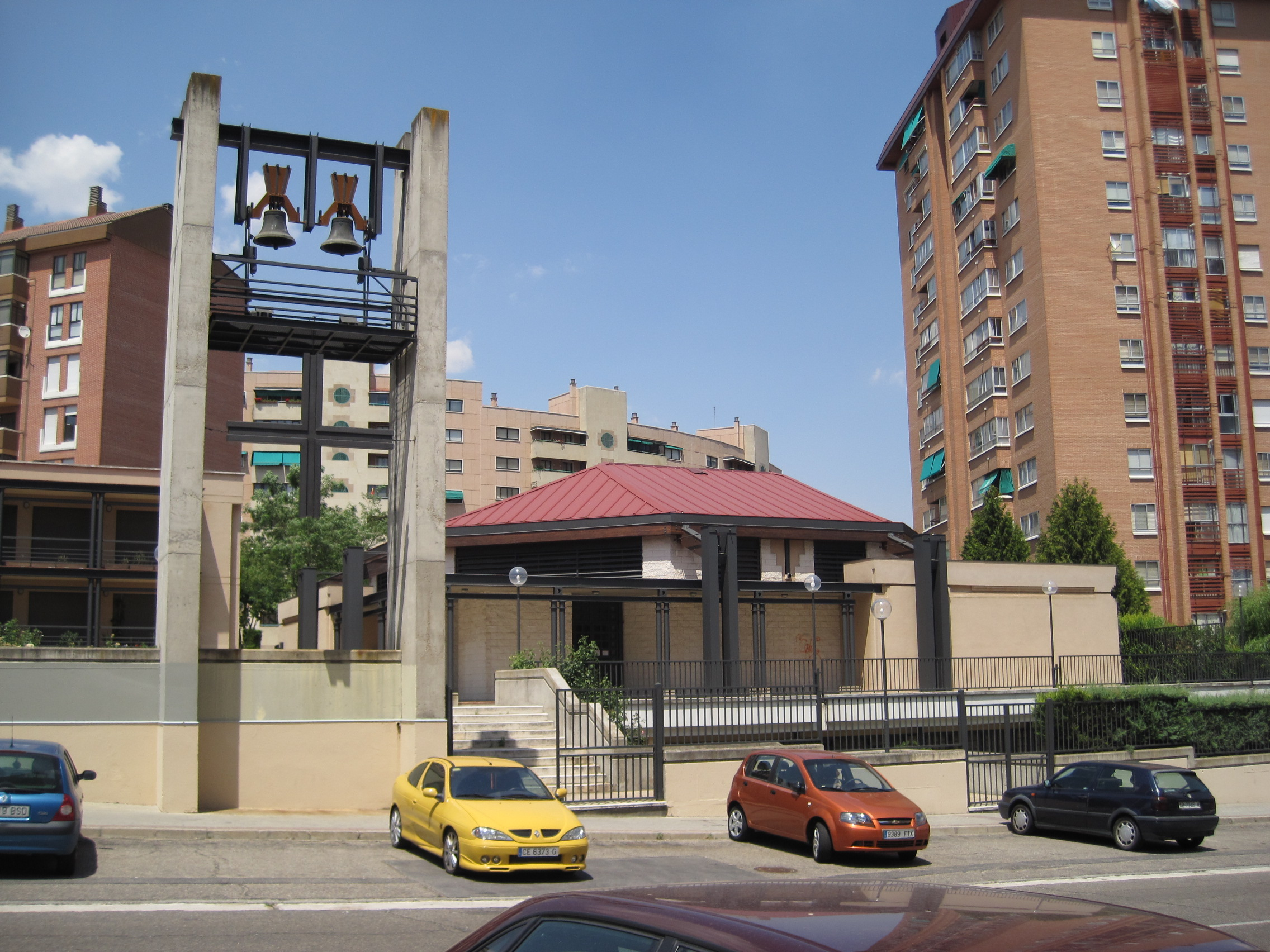 Iglesia de Cristo Redentor, en el barrio de Parquesol, Valladolid (España).